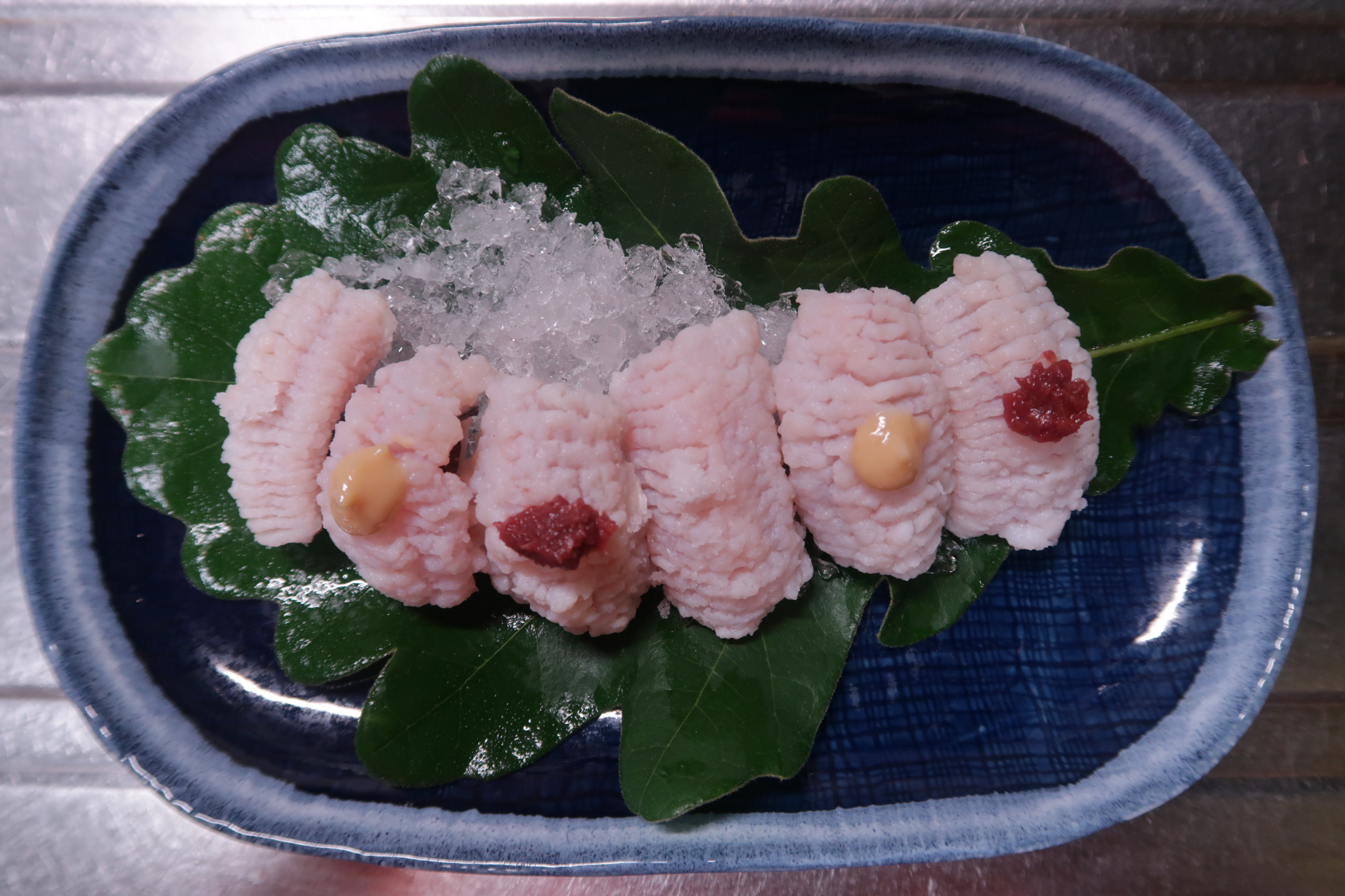 鱧の落とし、塩、辛子酢味噌、梅肉を添えて